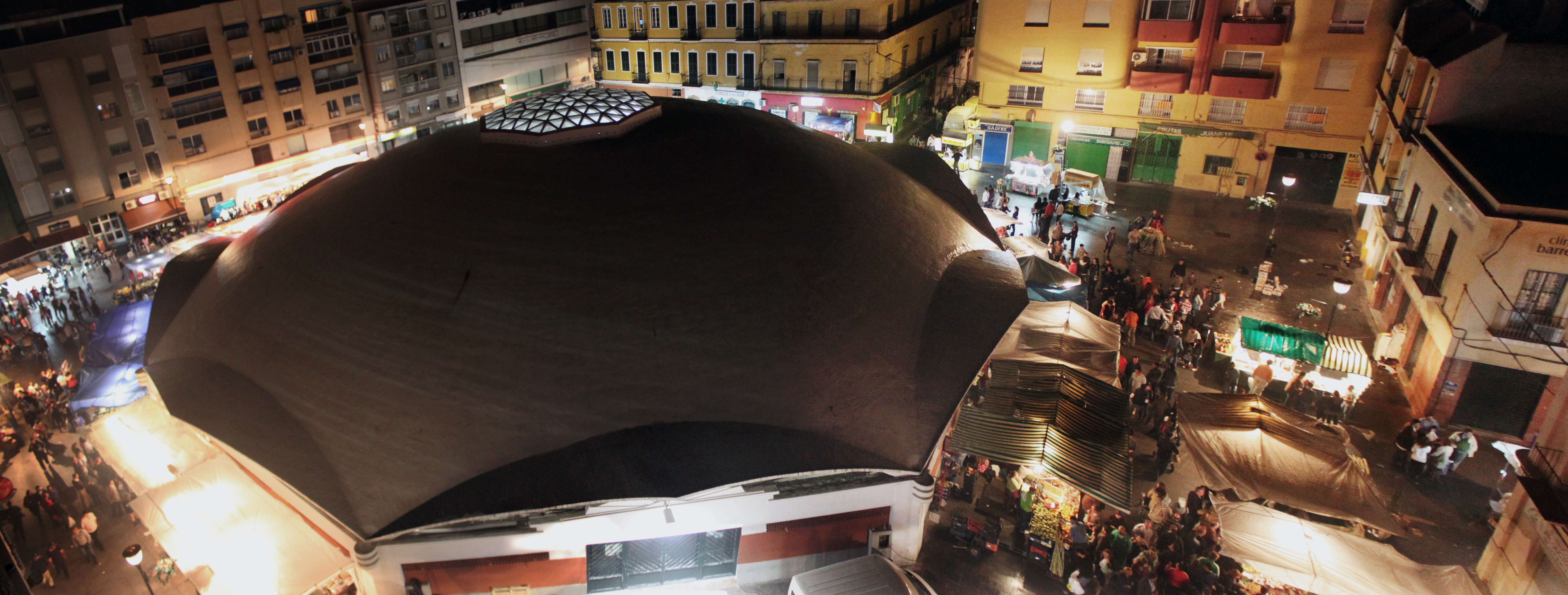 Mercado Ingeniero Torroja de Algeciras durante la fiesta de Tosantos (noche del 31 de octubre al 1 de noviembre).